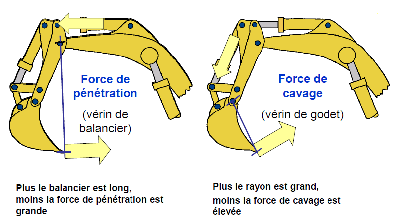 Pelle mécanique hydraulique (fleche et godet)